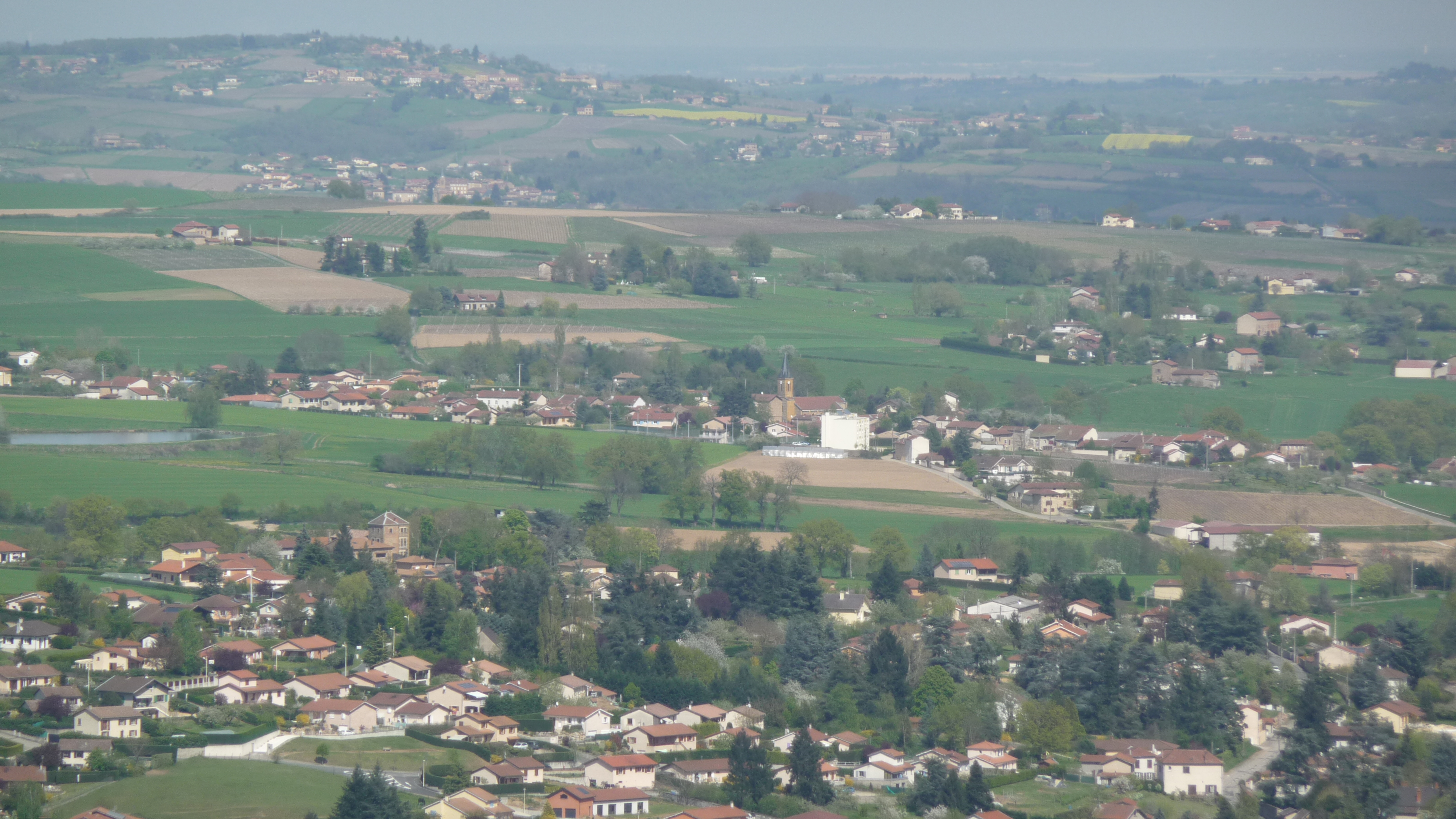 Les Olmes - Vue d'ensemble